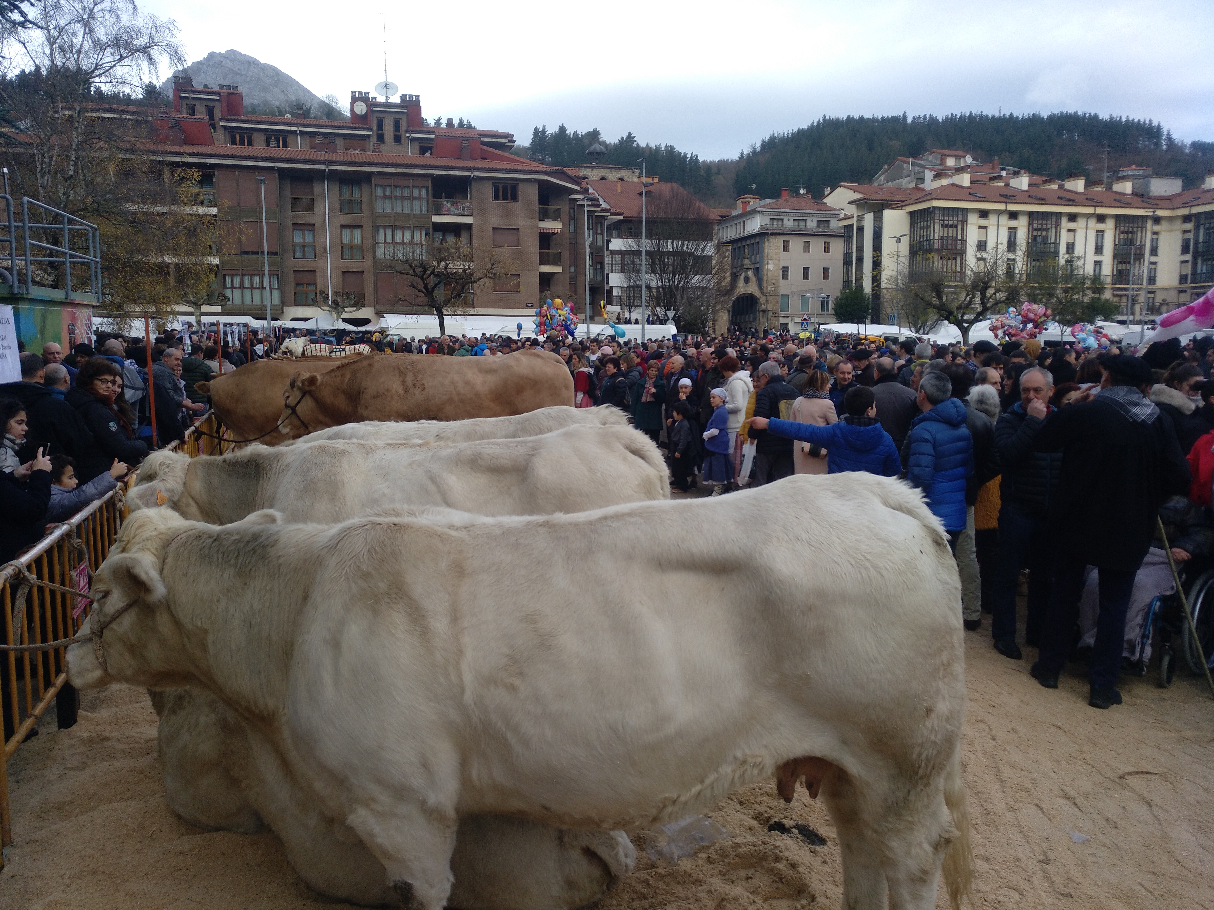 Santamasak Arrasaten 2019